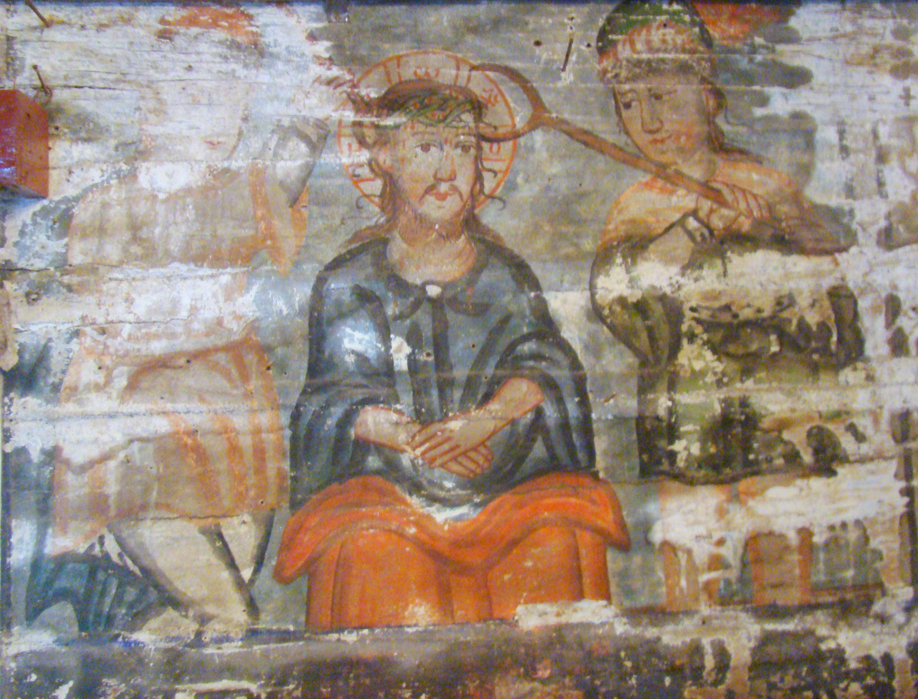 Patimile lui Iisus. Biserica de lemn din Purcăreț, comuna Letca, județul Sălaj